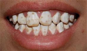 법랑질형성부전증2